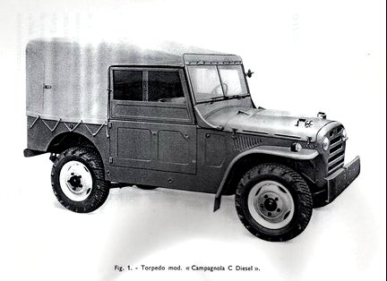 Campagnola diesel Clato destro